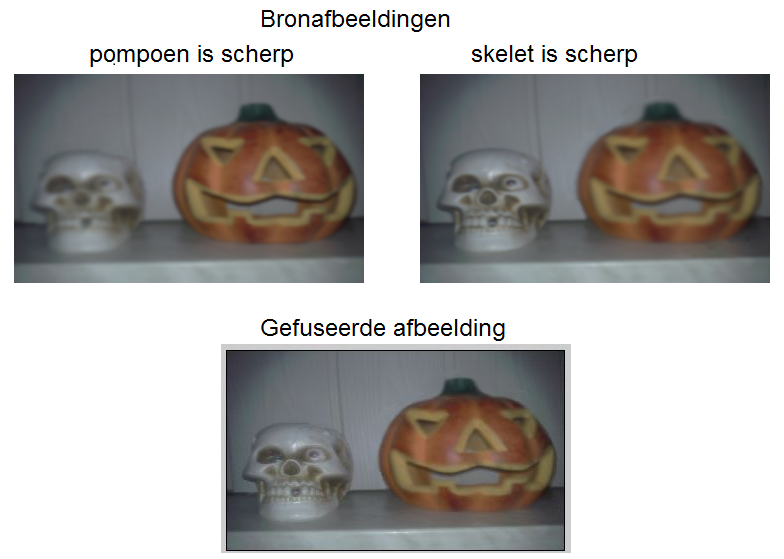 Fusie van twee afbeeldingen waarbij bij de bronafbeeldingen telkens een ander object is geblurd.